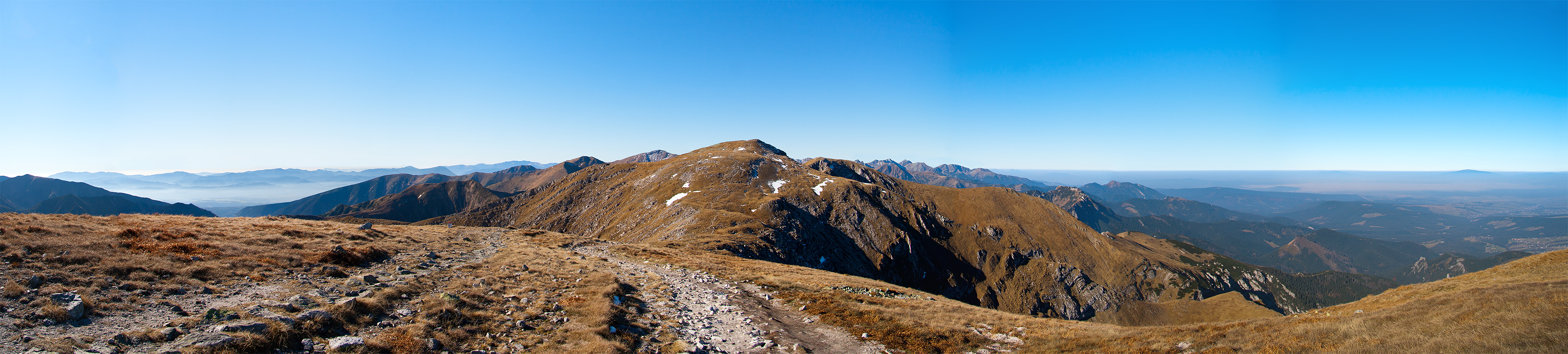 Panorama na Krzesanicę z Małołączniaka, w tle Ciemniak - masyw Czerwonych Wierchów Tatry Zachodnie